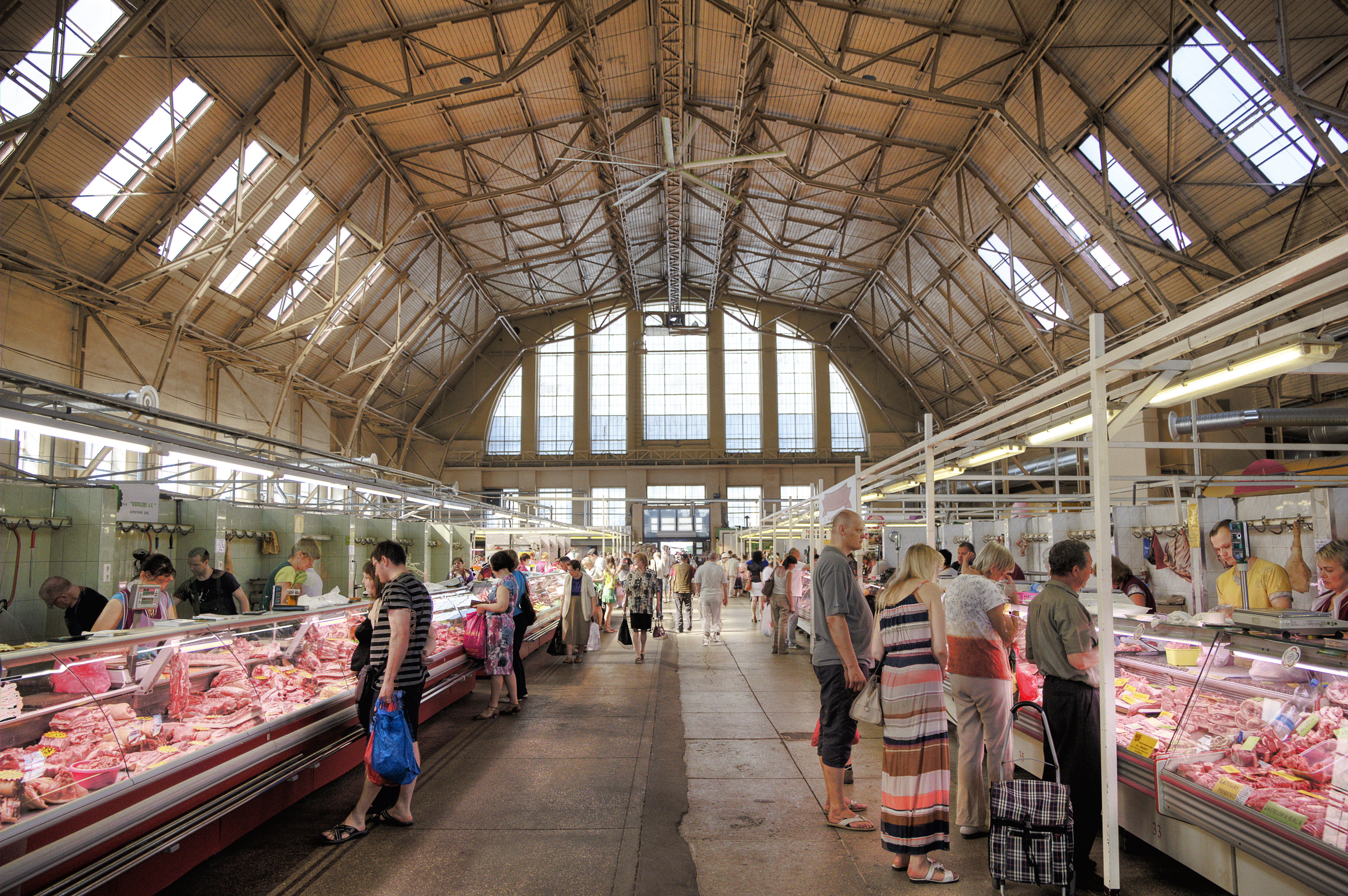 Riga Central Market